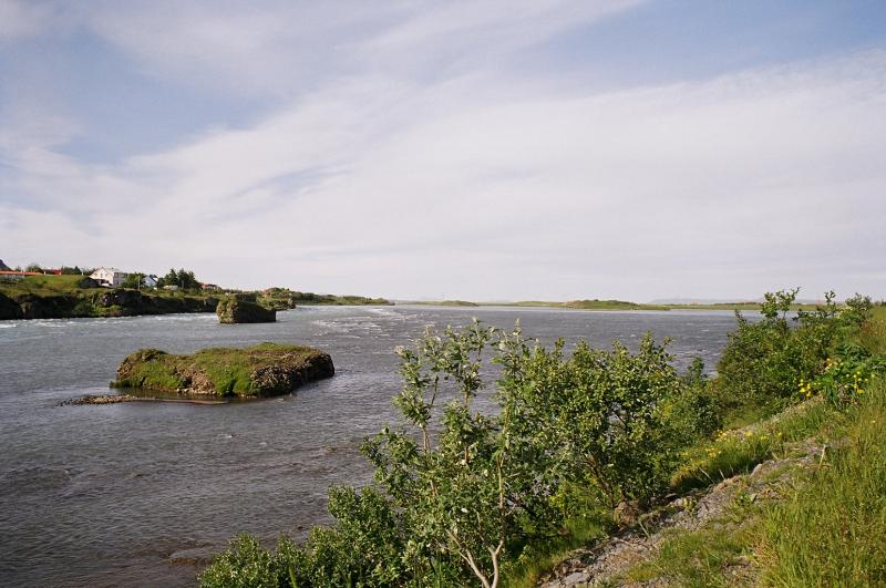 Il fiume Ölfusá a pochi metri dal ponte di Selfoss (Islanda sudovest). Foto fatta fine di giugno 2004.